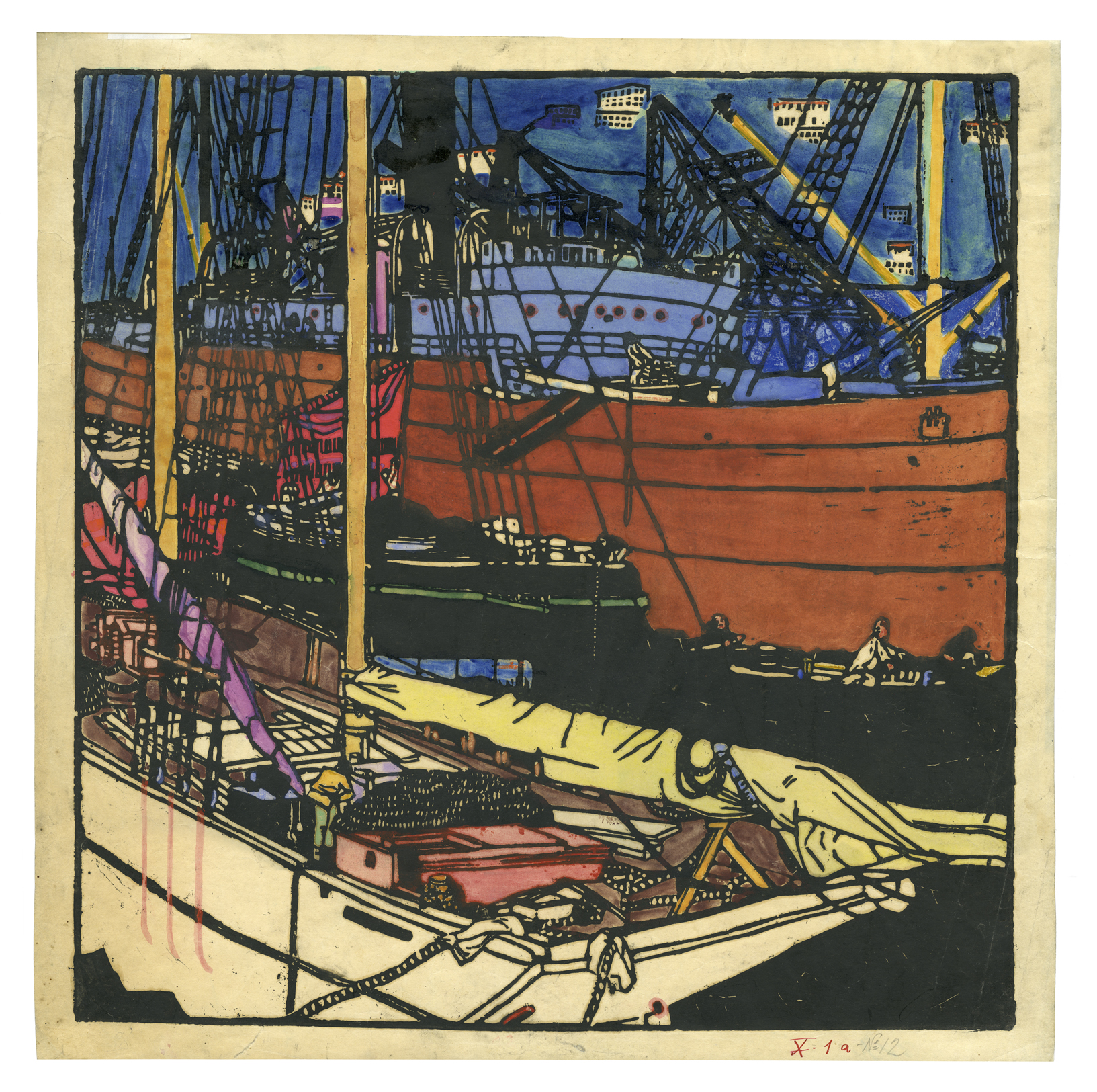 Rudolf Kalvach Farbholzschnitt Hafen von Triest